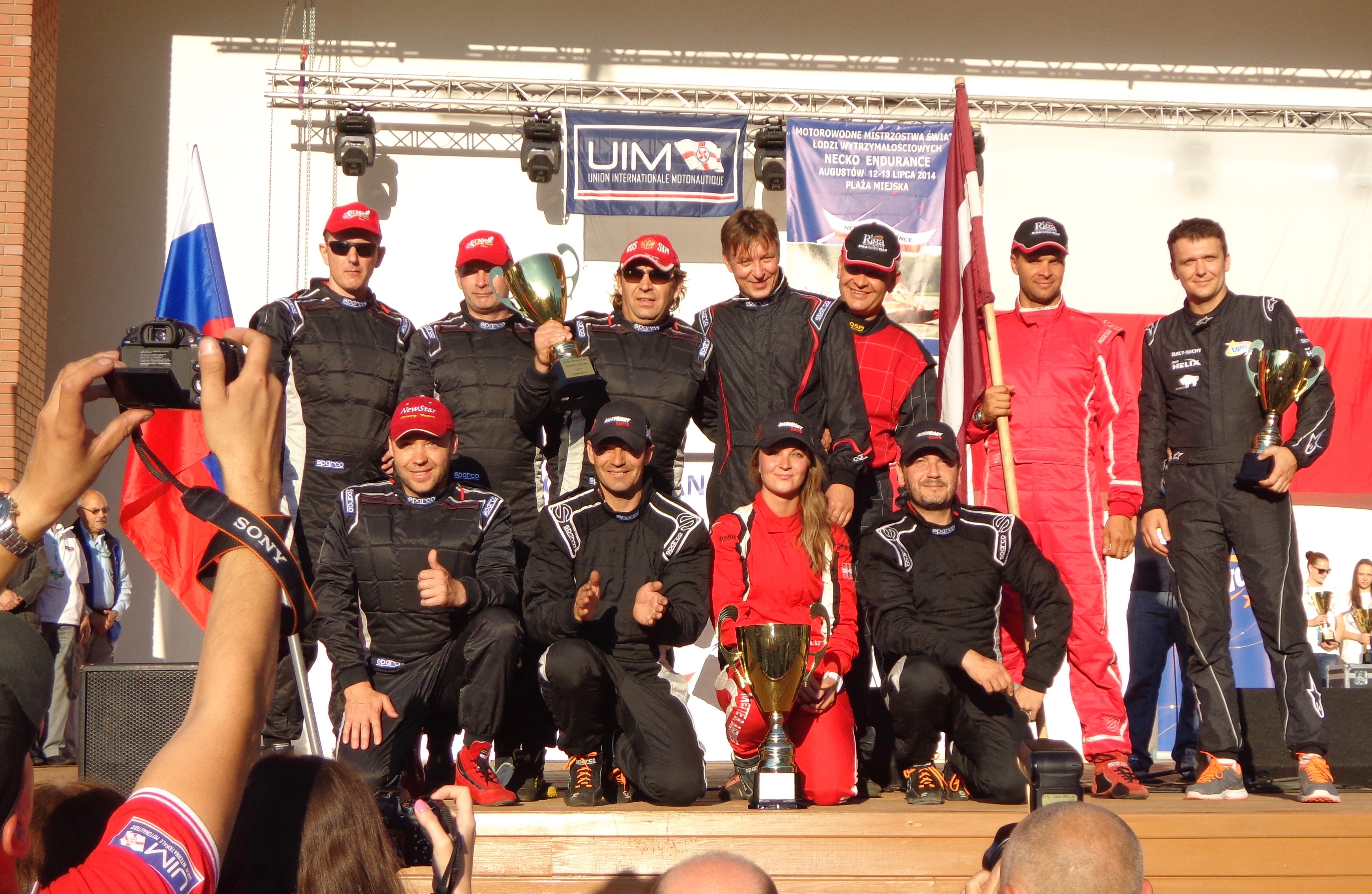 Mette Bjerknæs og team Navikart - Verdensmestere 2014